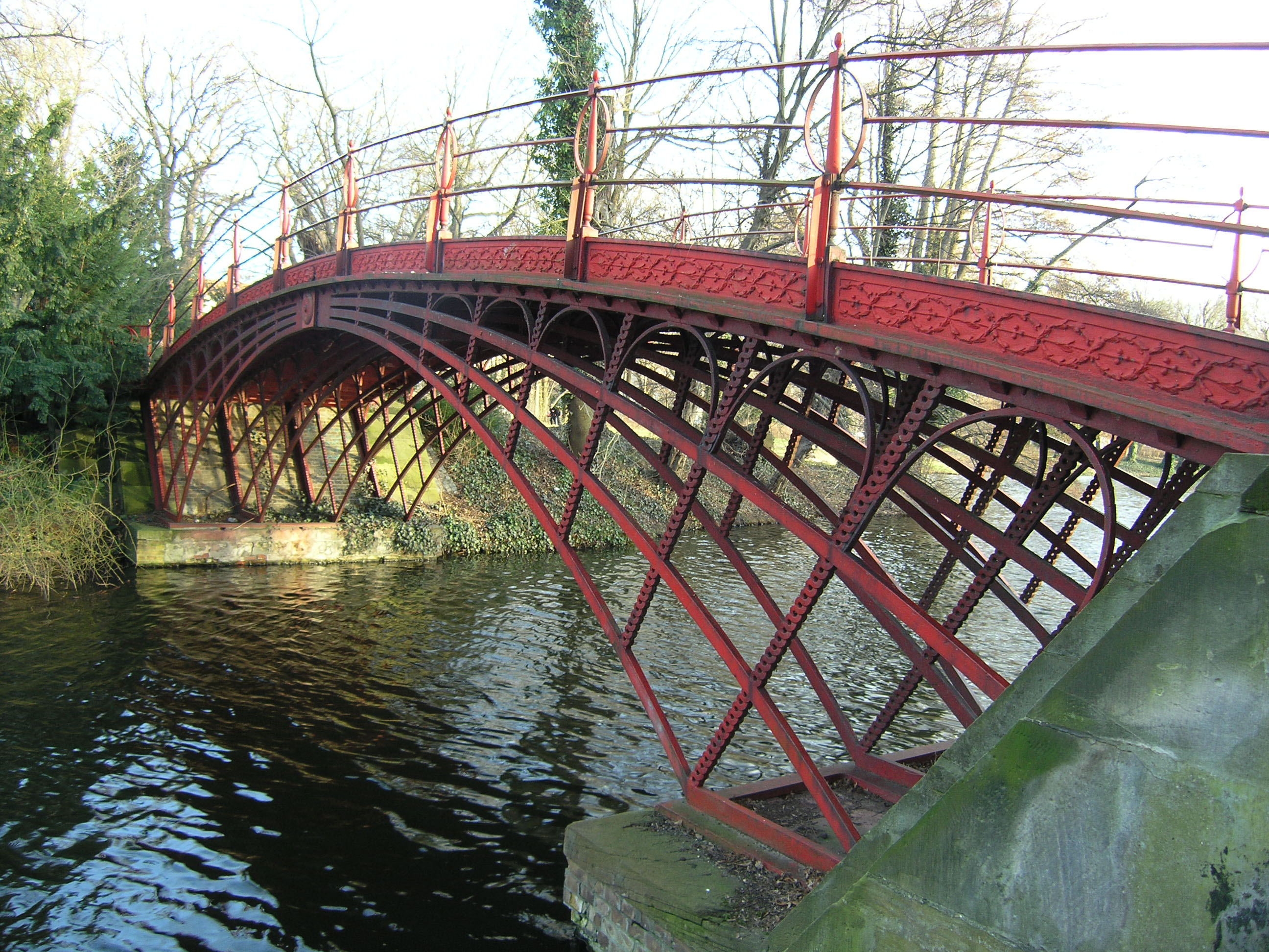 Hohe Brücke, Charlottenburger Schlosspark, Berlin